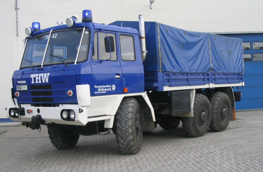 Tatra 815 des THW Ortsverband Staßfurt